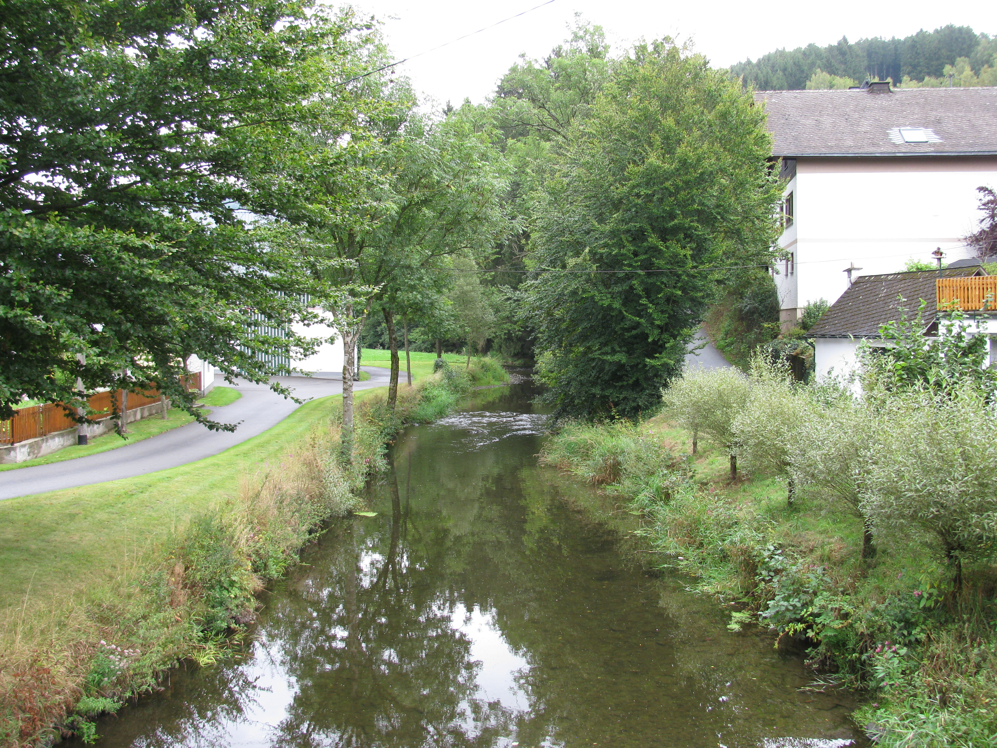 die Lenne oberhalb der Uentropstraße in Schmallenberg-Lenne